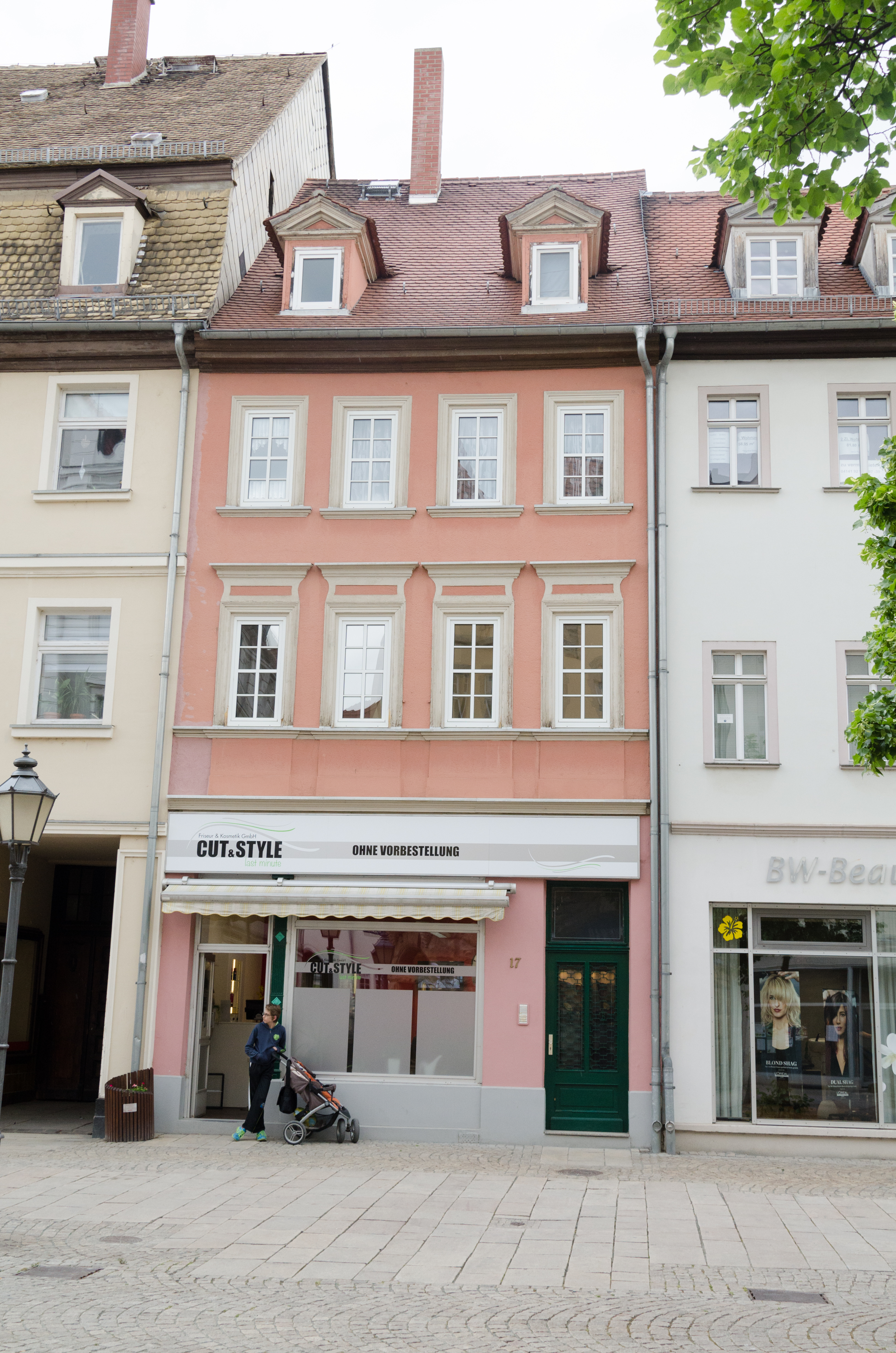 Zeitz, Roßmarkt 17